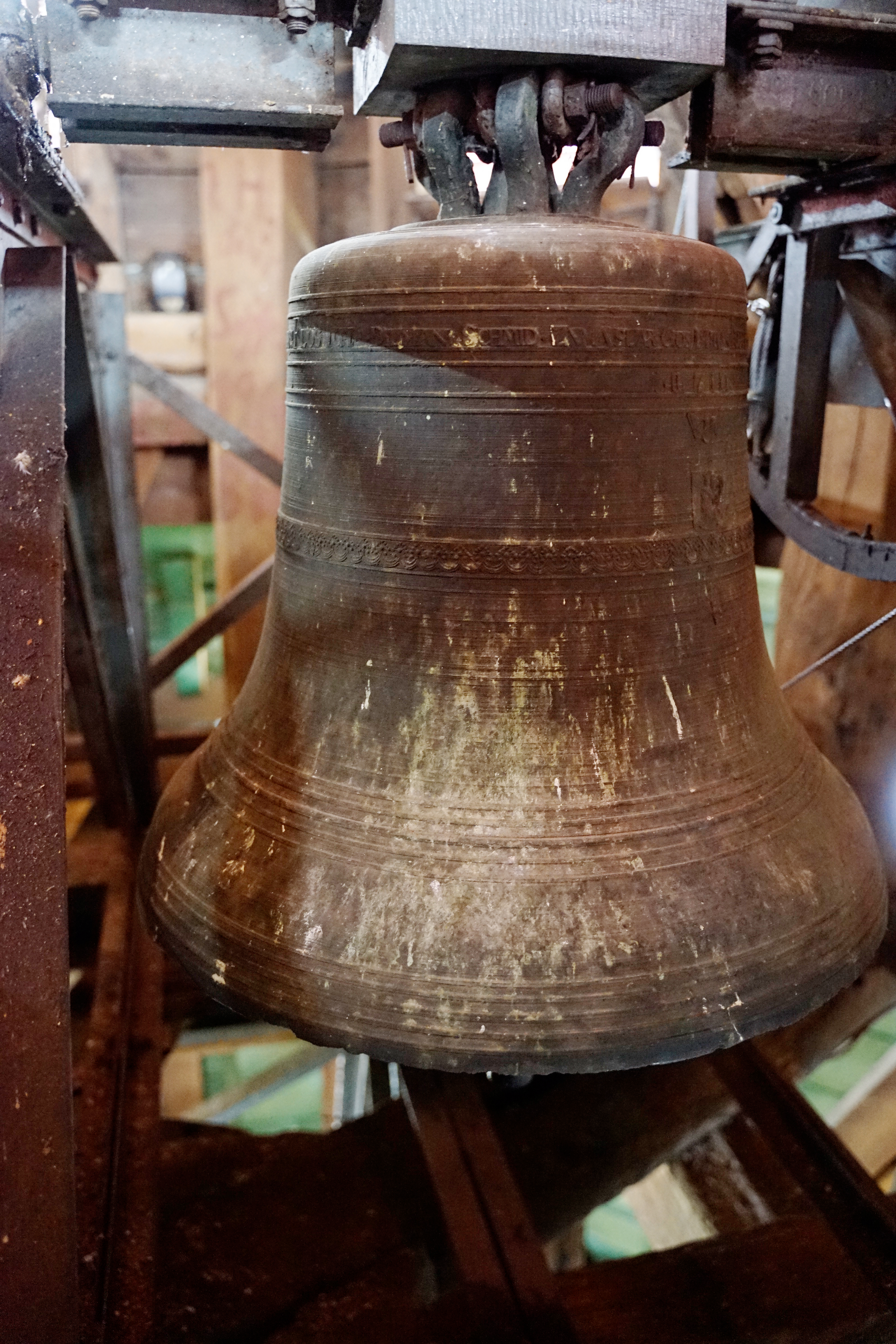 Evangelische Kirche Steindorf, Wetzlar, Lahn-Dill-Kreis, Hessen, Deutschland